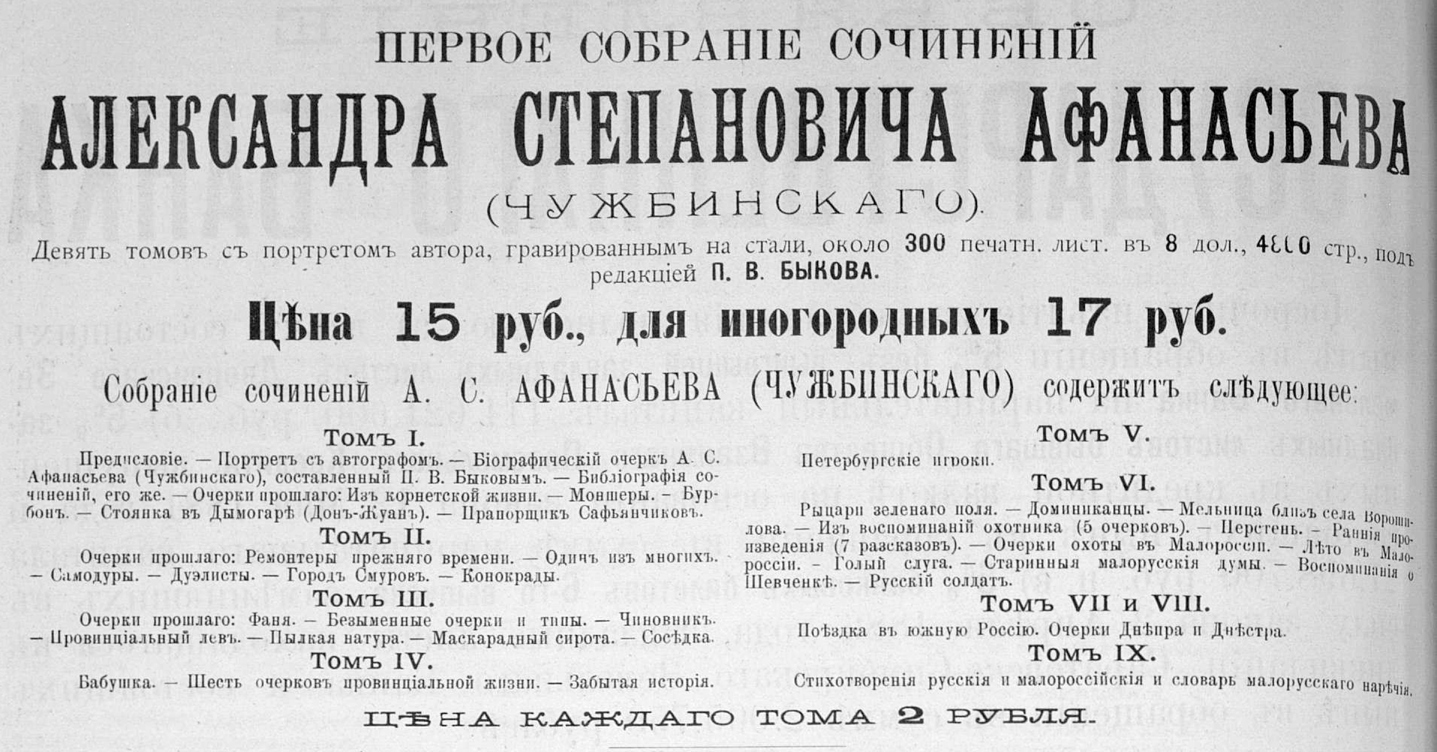 Реклама полного собрания сочинений Афанасьева-Чужбинского, 1894 год.